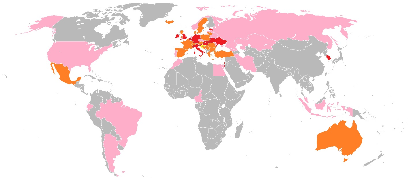 Carte de statistiques des matchs de la Croatie contre les autres sélections mondiales